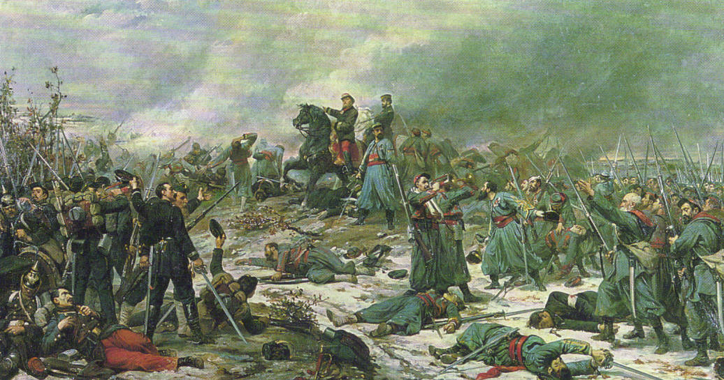 La Bataille de 1870 conte la Prusse, champ de bataille d'Auvours, à quelques kilomètres du Mans. Peinture réalisée par le Sarthois Lionel Royer, lui-même soldat dans les troupes françaises.